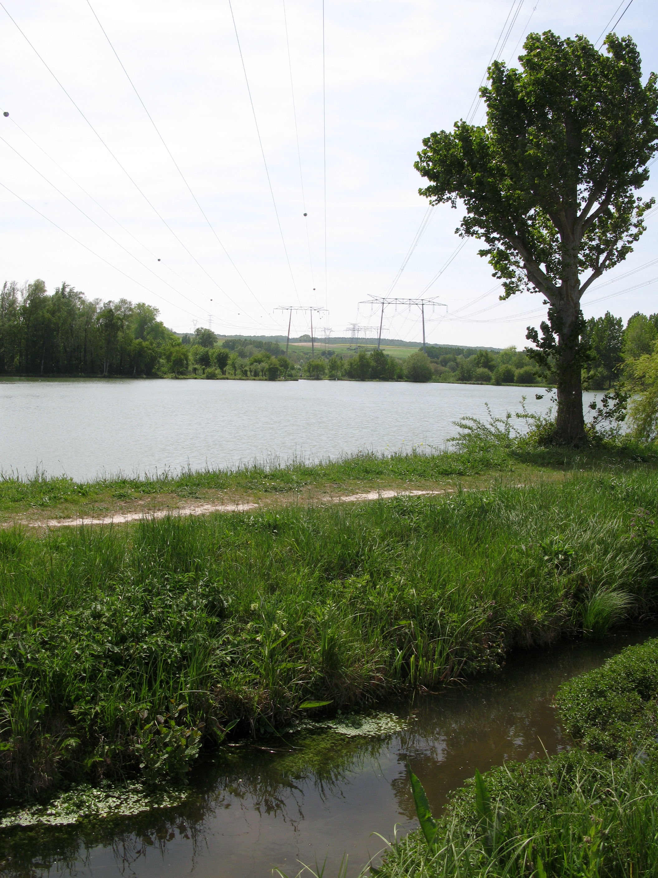 Argoeuves (Somme, France) - Marais et ligne à haute tension. La photo est prise (en direction du Sud-Ouest) depuis l'entrée du chemin menant à la base nautique.